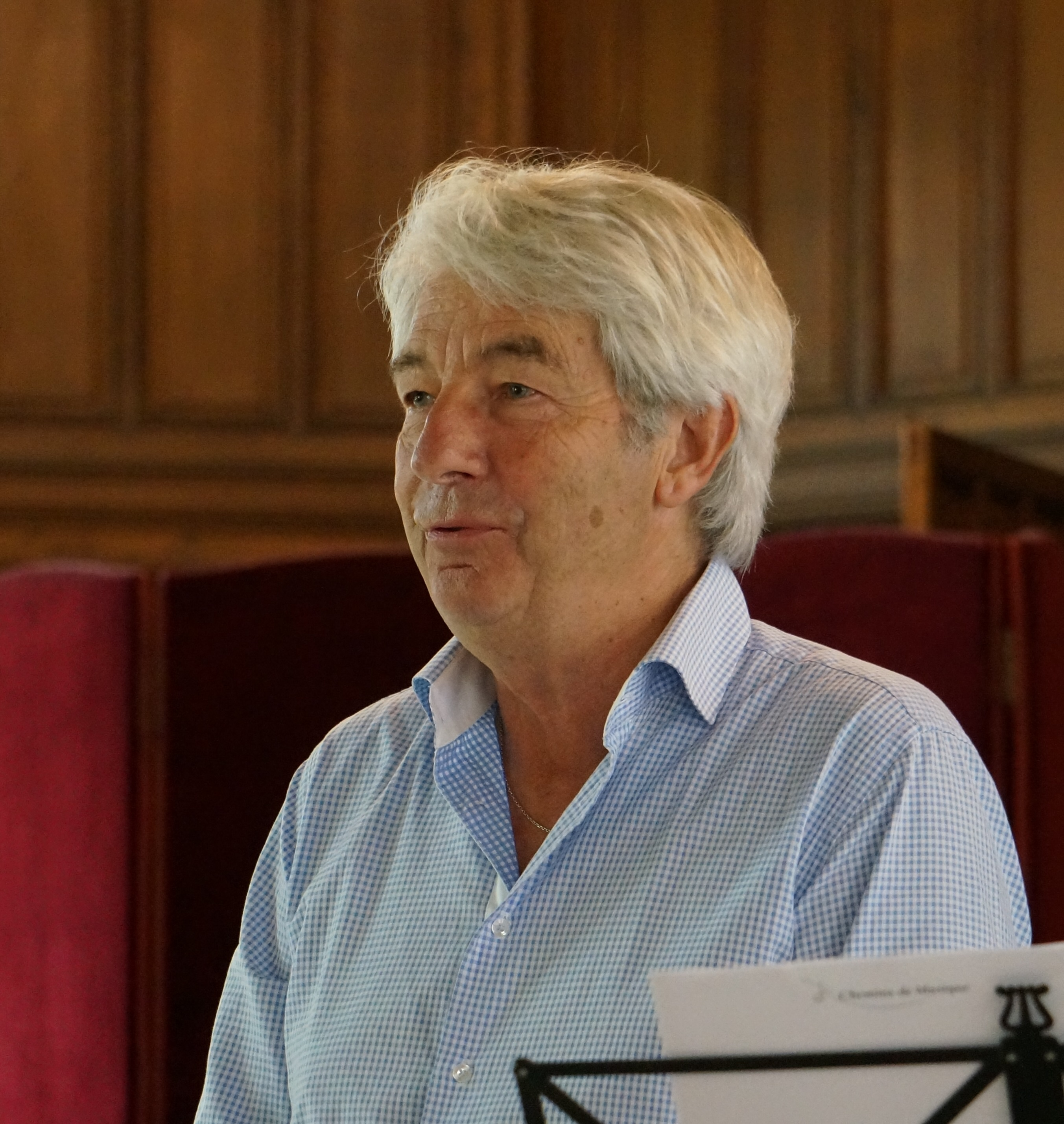 Jean-Philippe Collard lors des Flâneries Musicales, 2014.